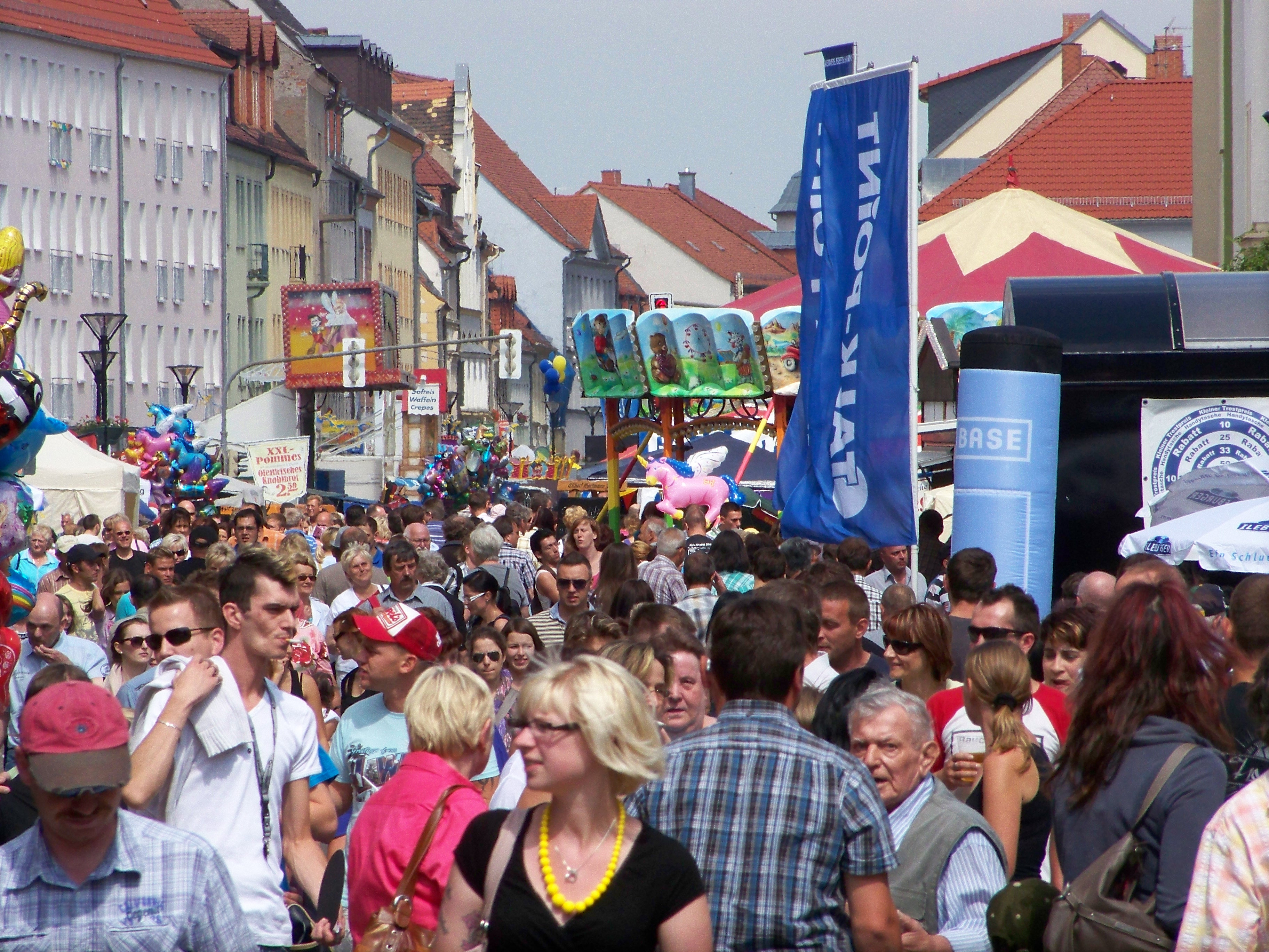 Leipziger Straße am Samstagnachmittag (11. Juni 2011)